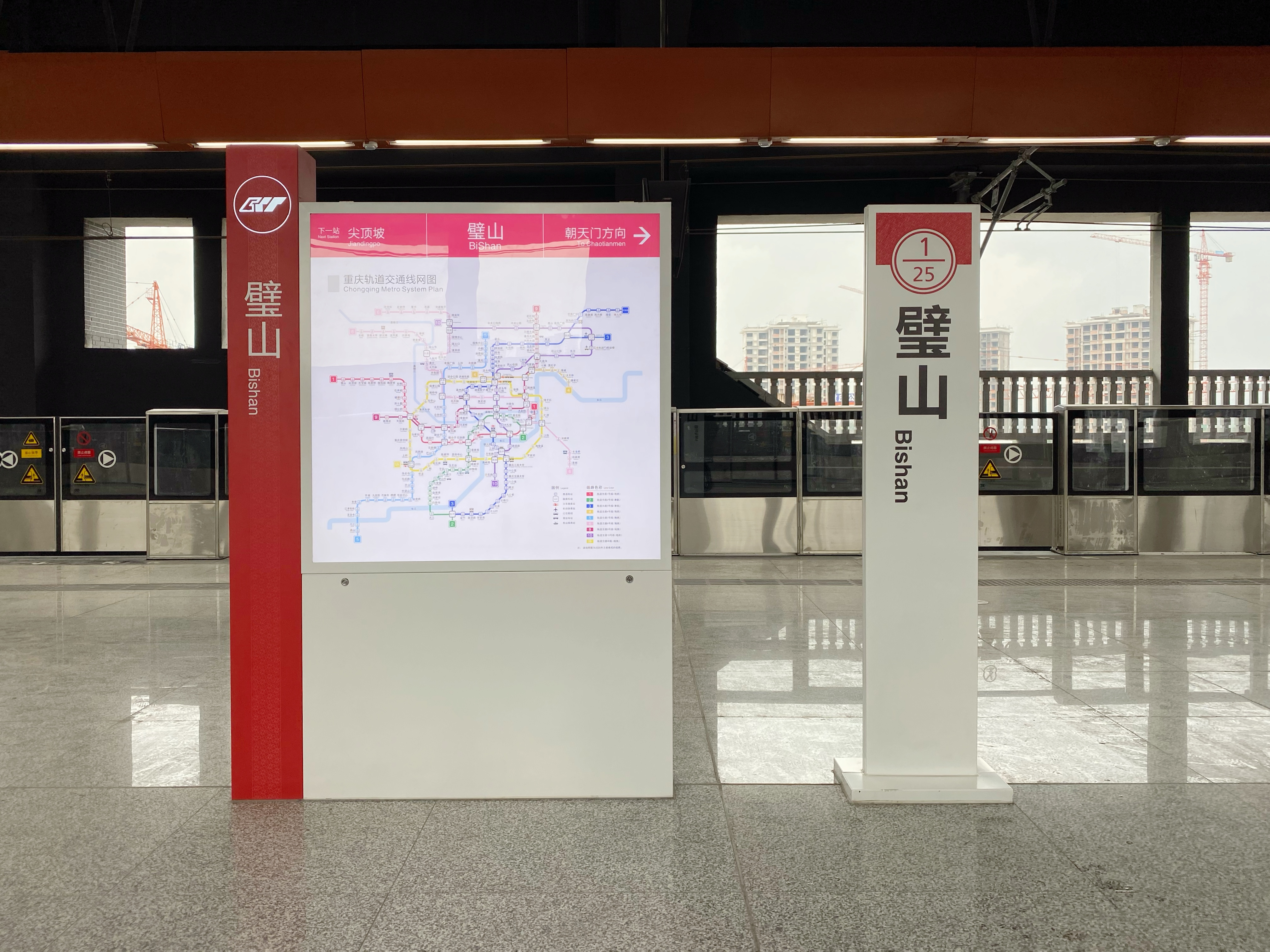 中文（中国大陆）: 重庆轨道交通 1 号线，市郊铁路轨道延长线璧山站站台，该段于 2014 年开工，并计划于 2019 年 12 月 28 日通车试运营。图片拍摄时处于调试状态，列车至尖顶坡站清客后，于璧山站前折返。该段通车也意味着重庆轨道交通首次由主城区进入重庆市区县。